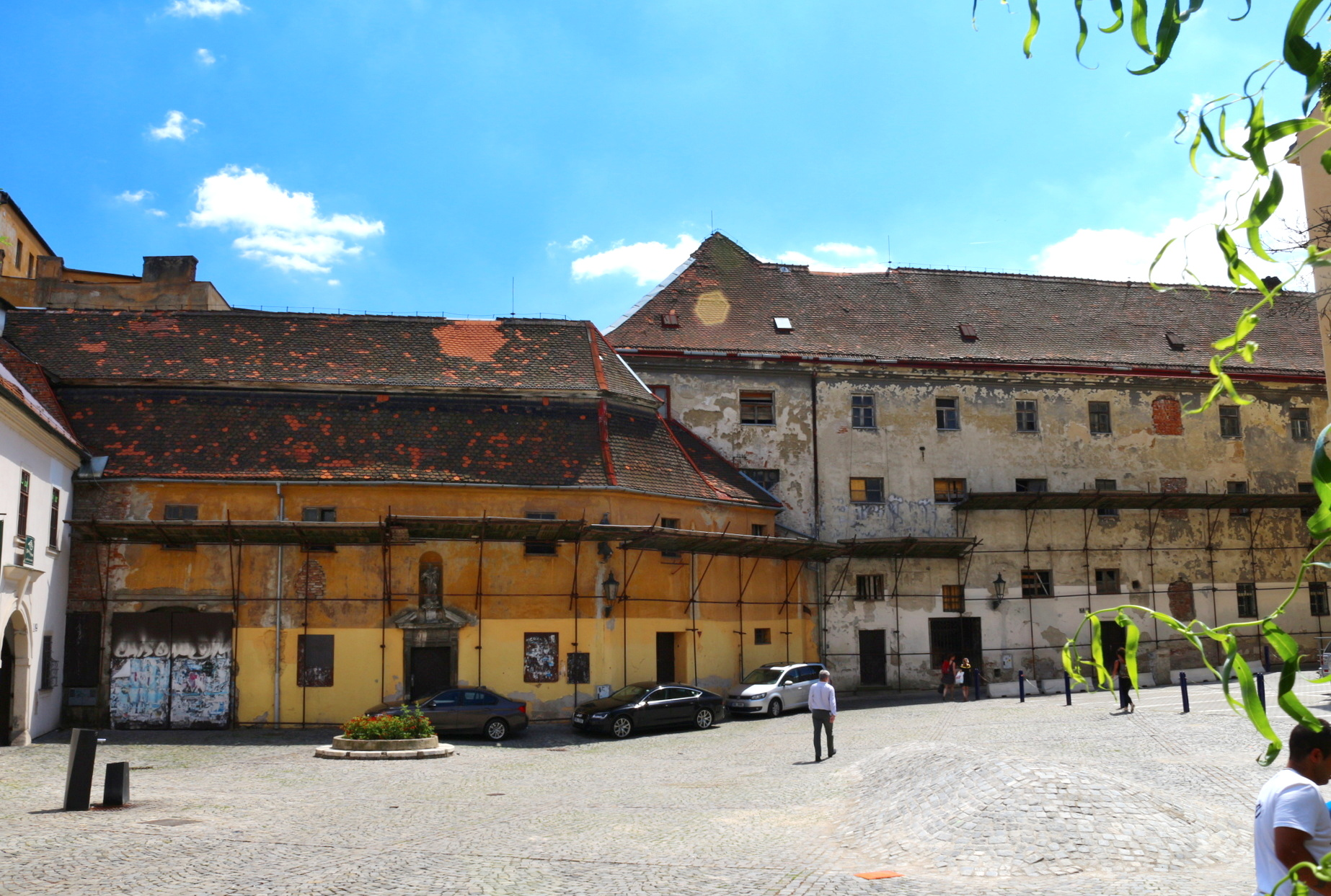 Františkánský klášter v Brně